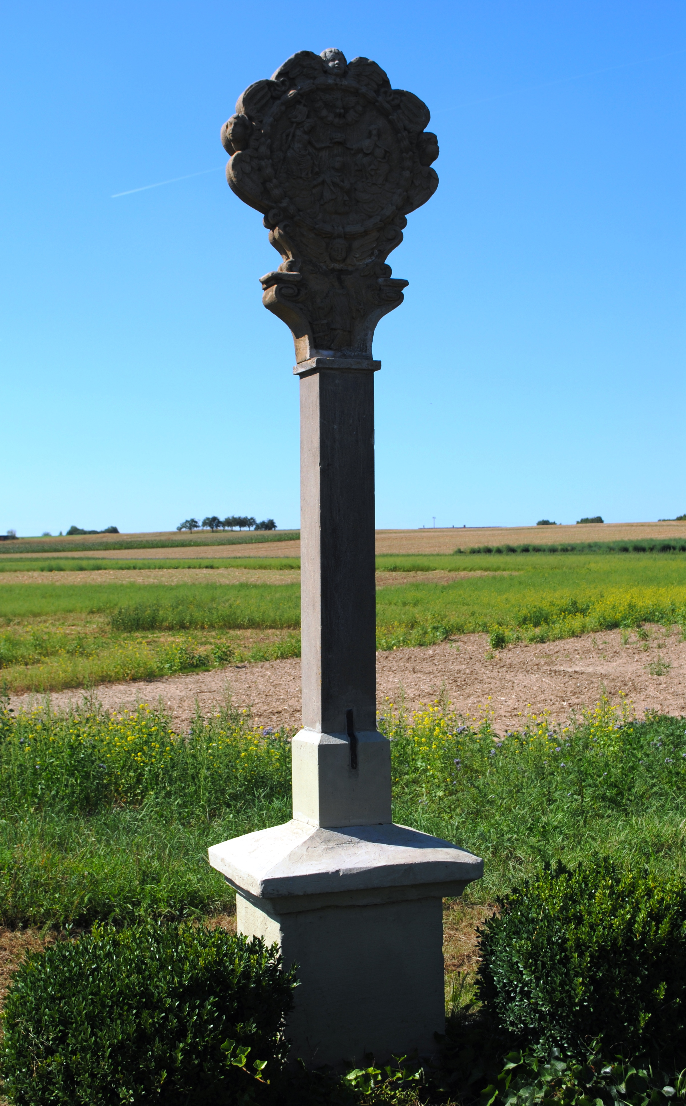 Bildstock, Weg nach Neuses, Schwarzenau, Mariä Krönung